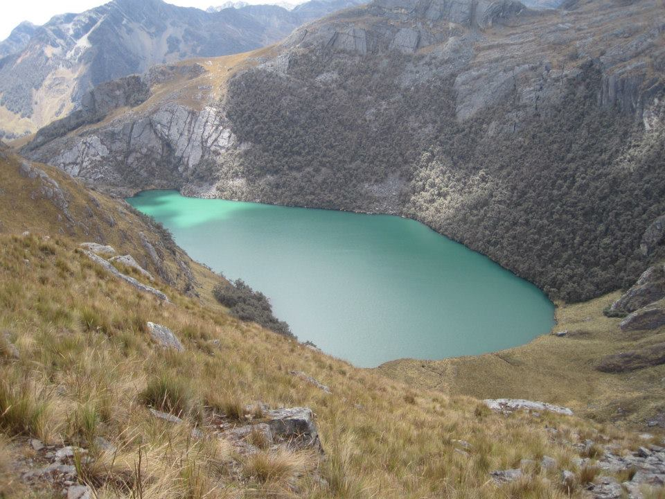 Laguna Pacarisha a 4424